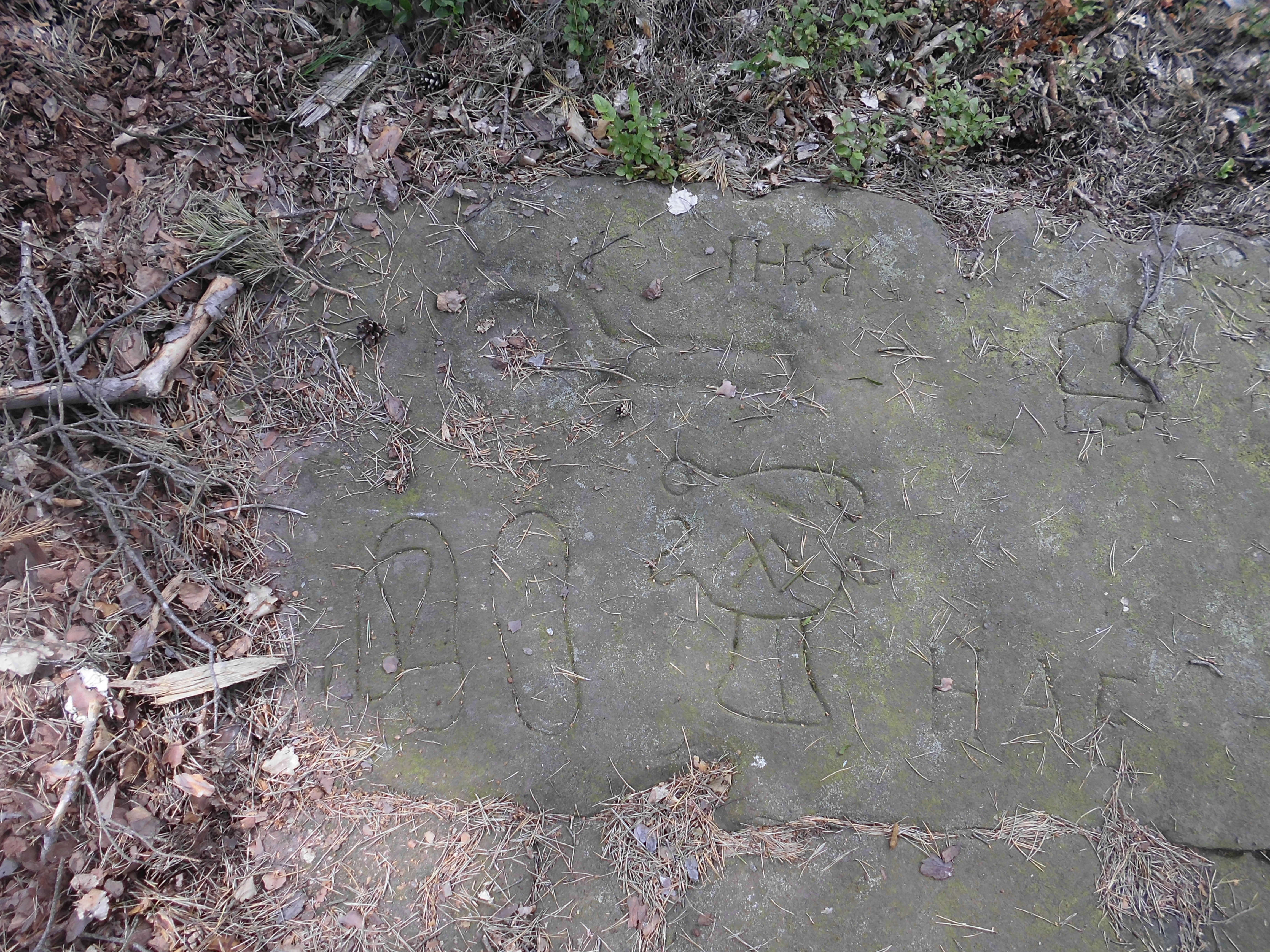 Loogfelsen an der Gemerkungsgrenze zwischen Deidesheim, Wachenheim und Forst